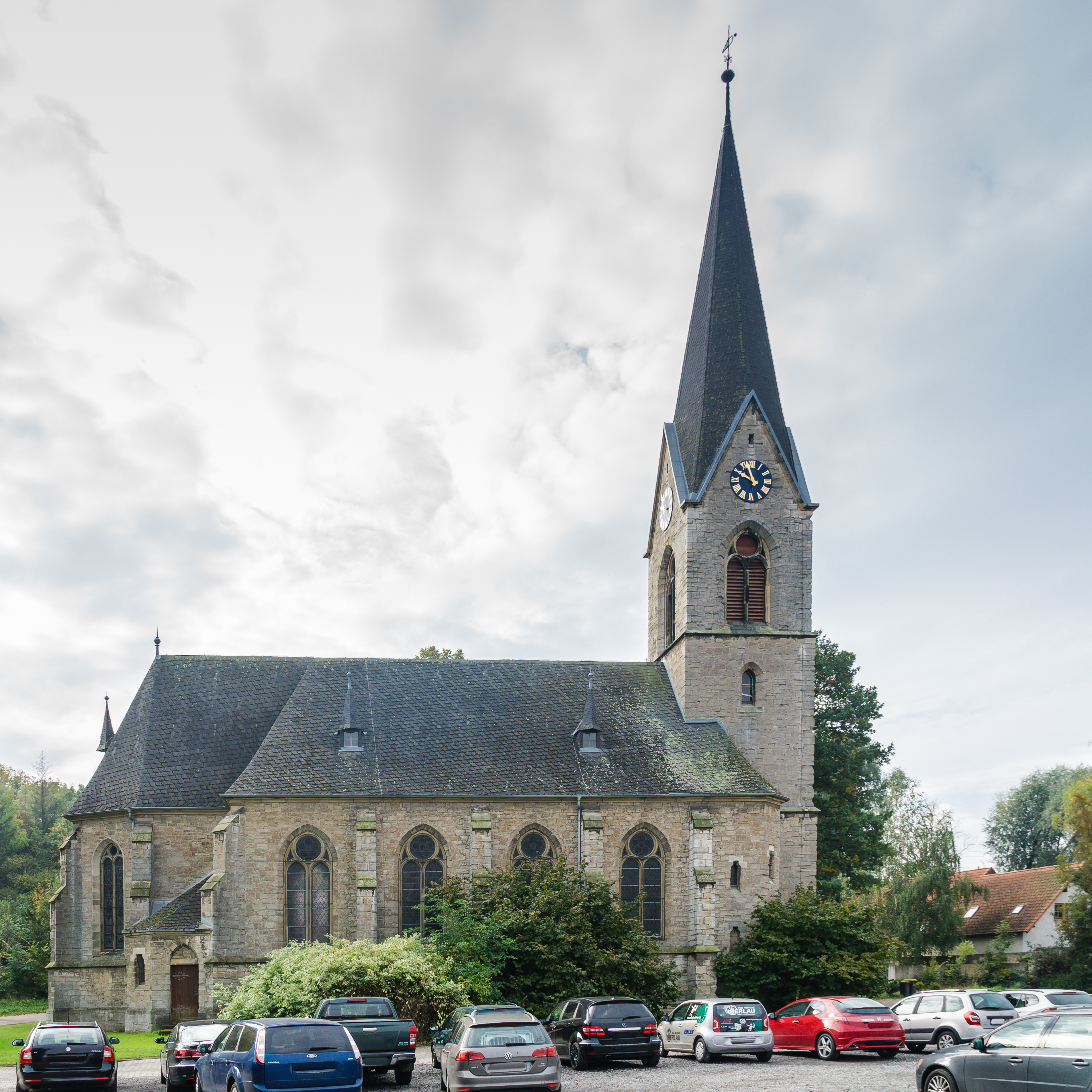 Kirche, Kirchplatz in Könnern OT Belleben